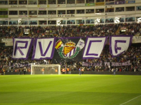 Pancarta Grada Norte